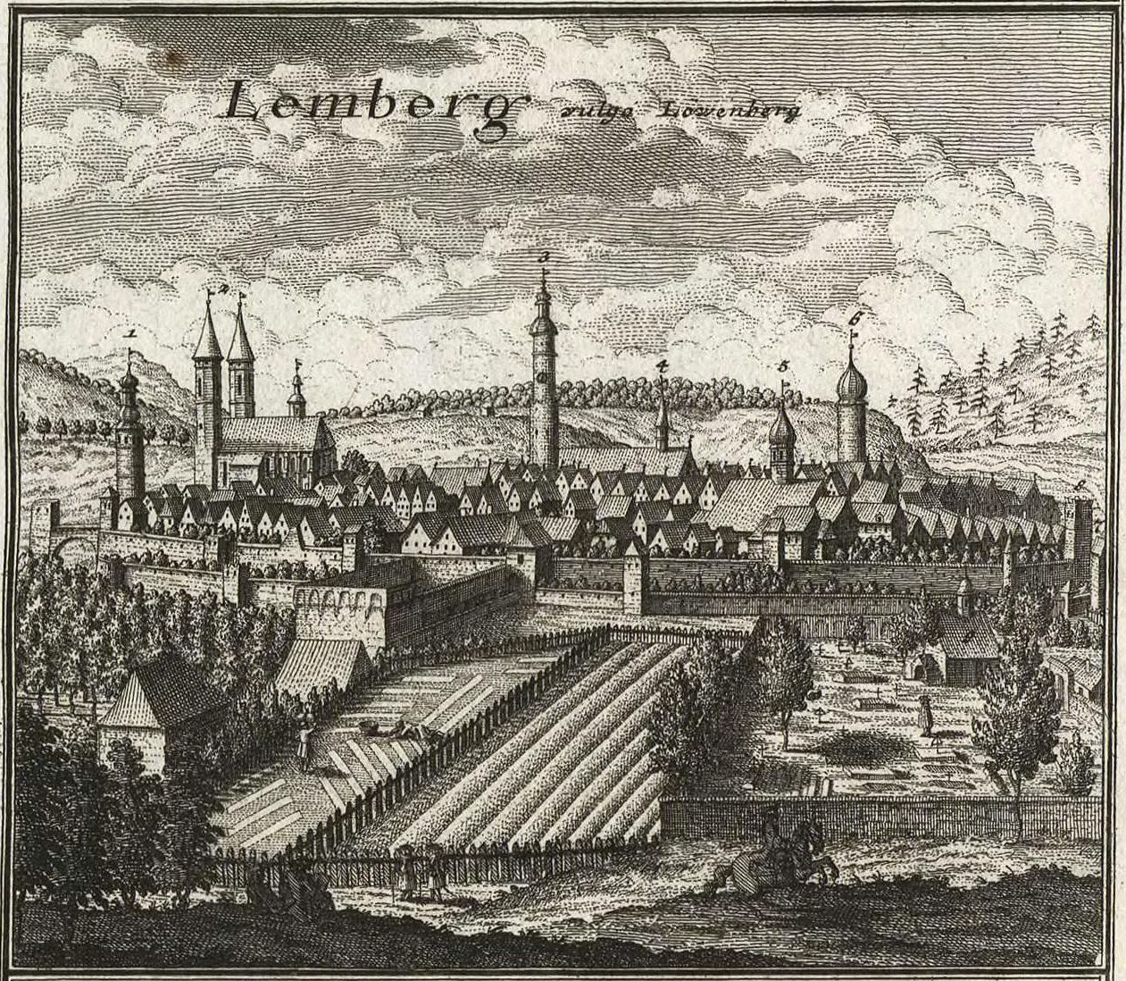 lwówek śląski 1739 werner panorama